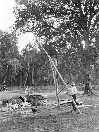 Puit balancier dans les Landes (Aquitaine) vers 1925, Georges-Louis Arlaud